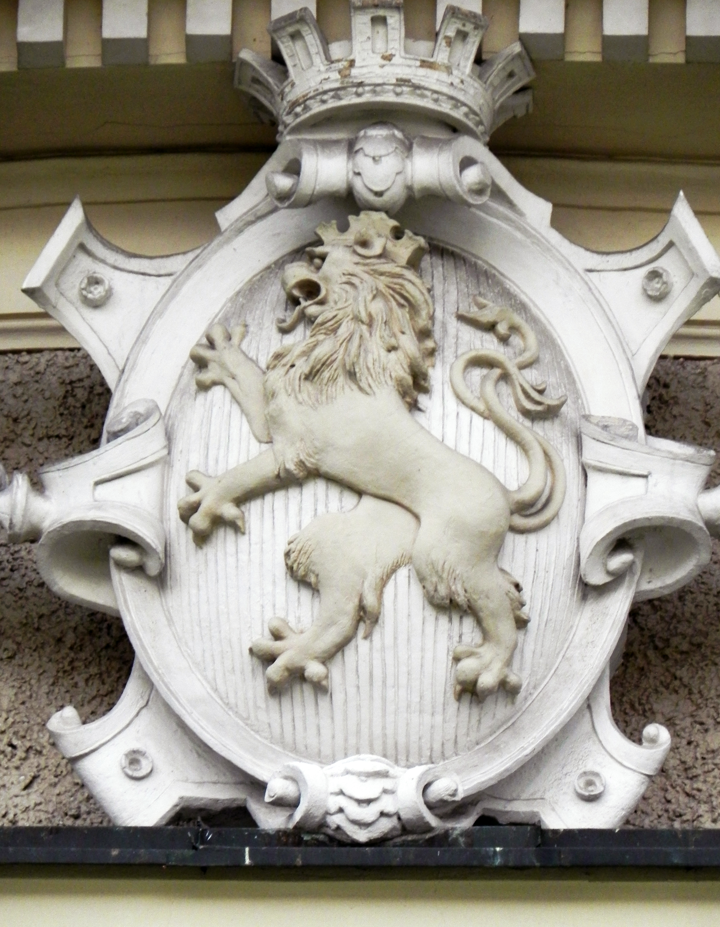 Lądek-Zdrój, zakład przyrodoleczniczy Wojciech, XVII, XIX